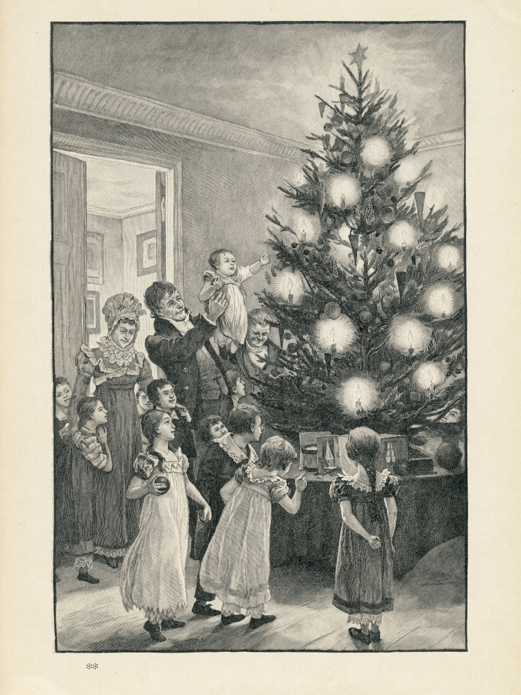 Gezin bij de kerstboom. Uit: Sprookjes van H.C. Andersen, werelduitgave, [1899-1900]. Signatuur: KW 9196 A 13[-15], deel 2, plaat 9.